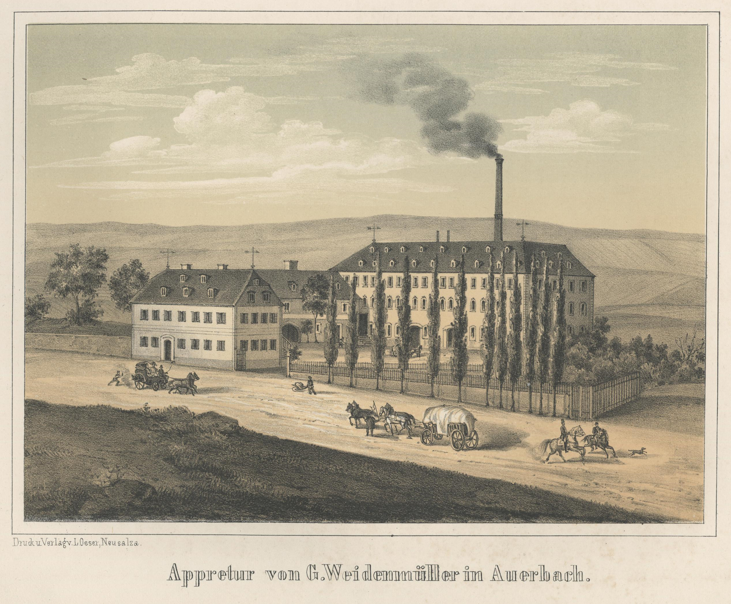 Appretur von G. Weidenmüller in Auerbach aus: Album der Sächsischen Industrie Erster Band